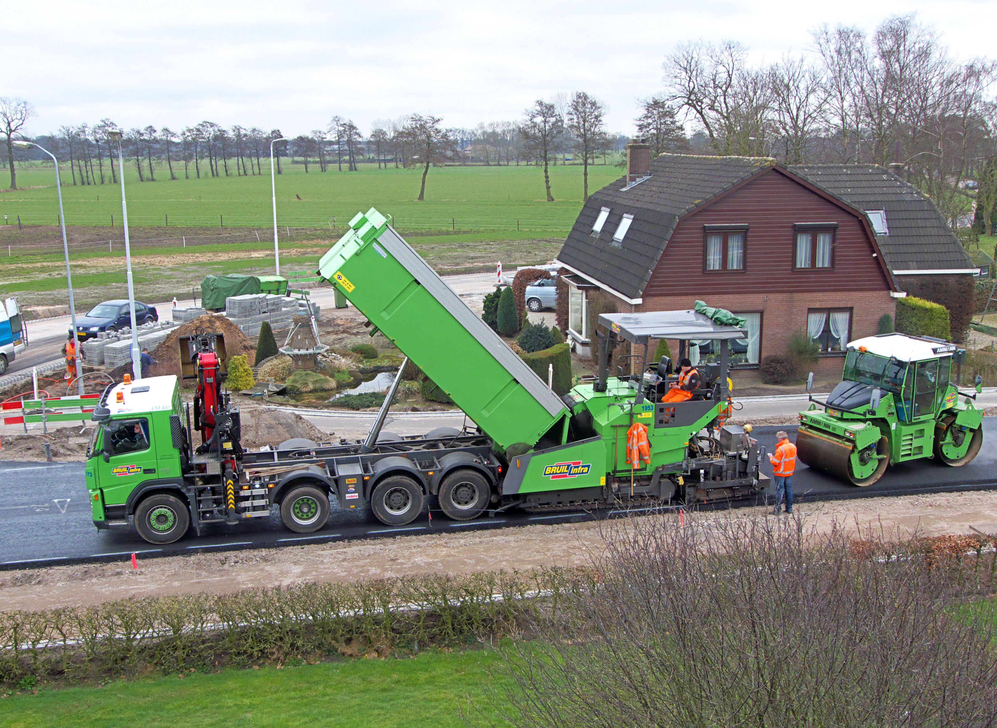 Asfaltering Renswoudsestraatweg bij de Walderveense molen